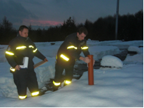 Schneehoehenmessung